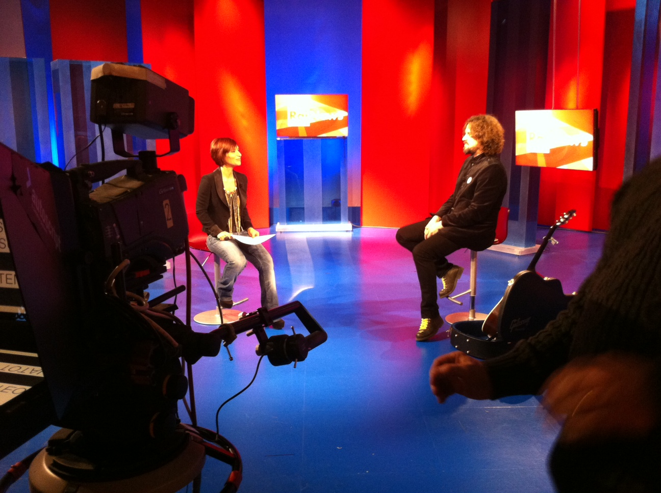 Luca Bassanese negli studi di Rai News 24 intervistato da Patrizia Morgani